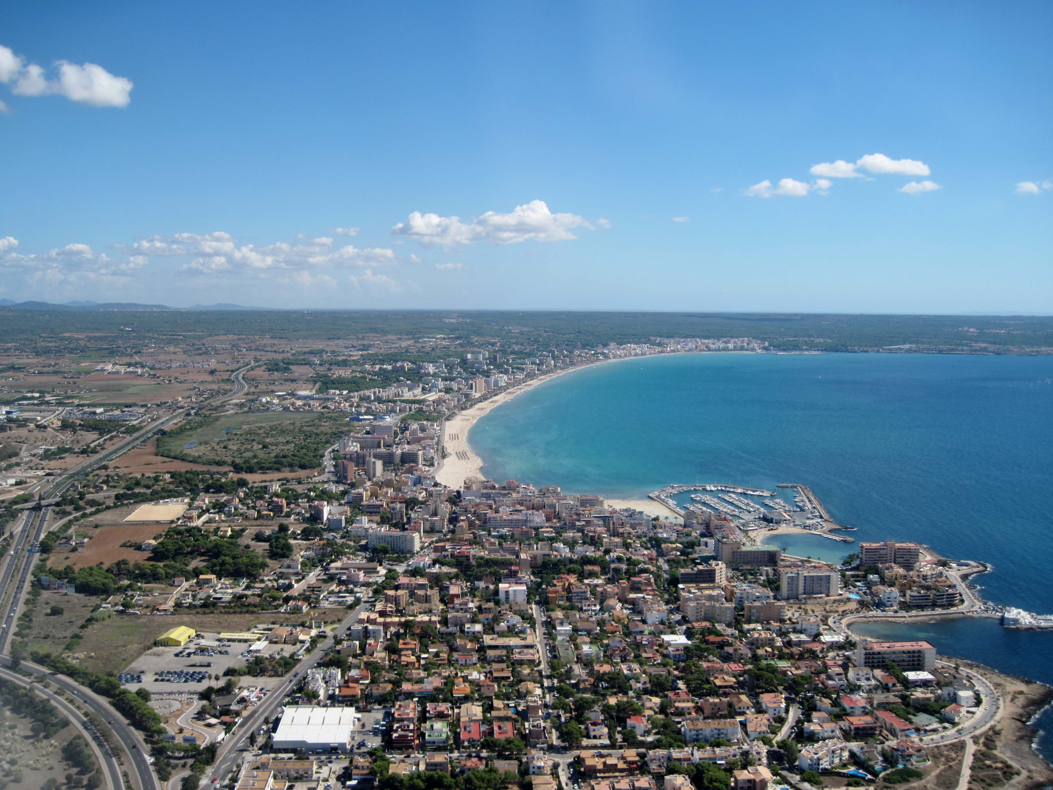 Luftbild der Platja de Palma mit Can Pastilla im Vordergrund, Mallorca, Spanien